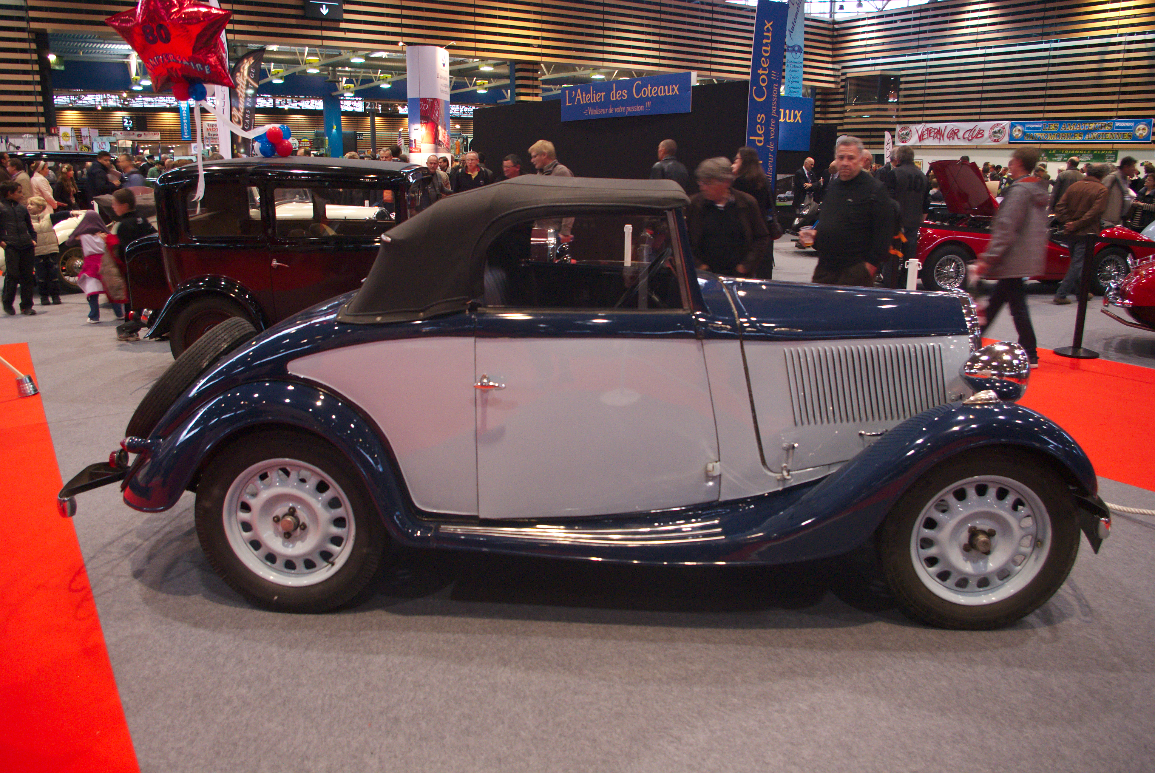 Fiat Française Balilla 6cv Cabriolet à Epoqu'auto 2012